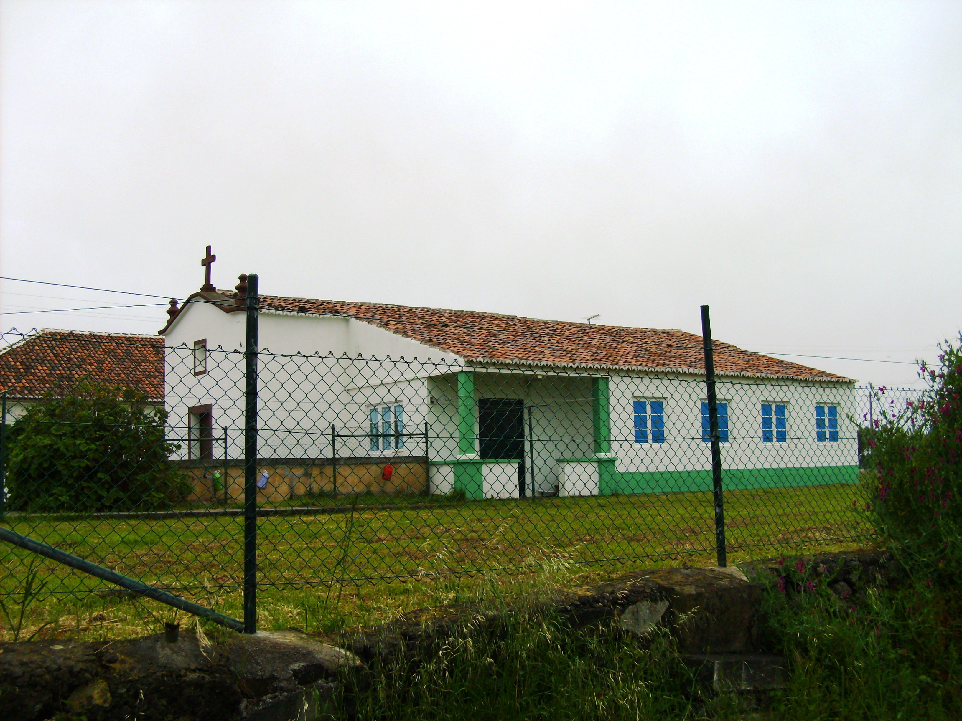 Ermida de Nossa Senhora Mãe de Deus, Ilha de Santa Maria (Açores), Portugal.